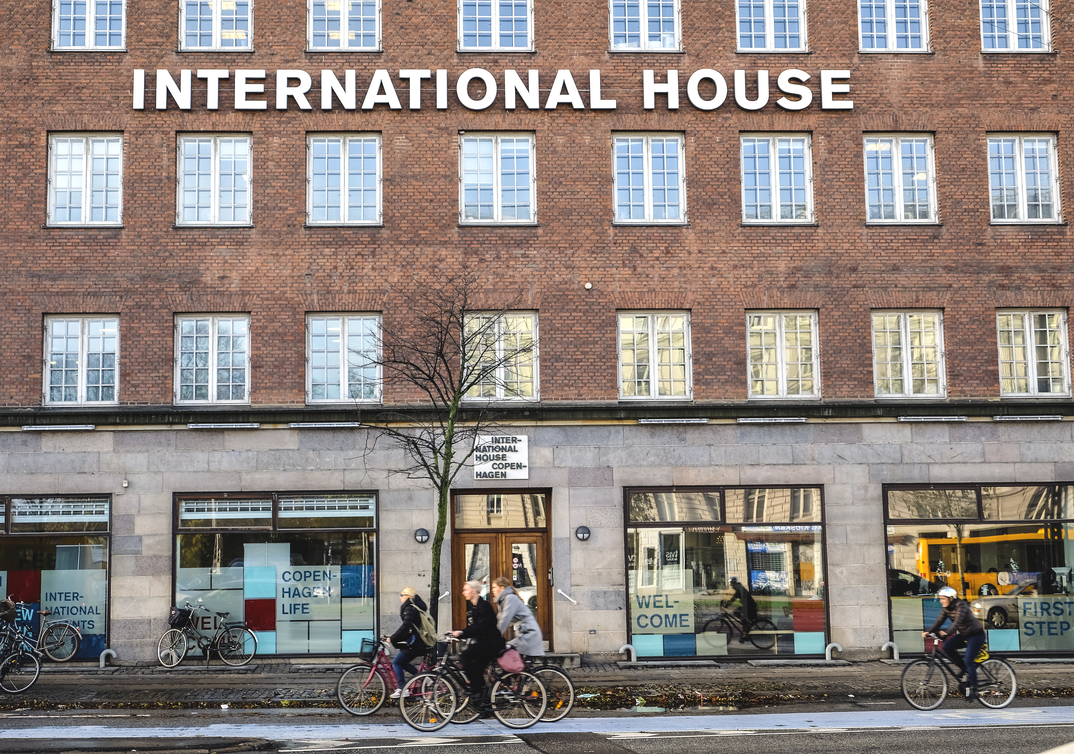 International House i Köpenhamn 20151109. Foto: News Øresund - Johan Wessman © News Øresund(CC BY 3.0) Detta verk av News Øresund är licensierat under en Creative Commons Erkännande 3.0 Unported-licens (CC BY 3.0). Bilden får fritt publiceras under förutsättning att källa anges (Foto: News Øresund + fotografnamn). The picture can be used freely under the prerequisite that the source is given . News Øresund, Malmö, Sweden. News Øresund är en oberoende regional nyhetsbyrå som ingår i oberoende dansk-svenska kunskapscentrat Øresundsinstituttet som drivs utan vinstsyfte med finansiering från närmare 100 medlemmar i offentlighet, akademi och näringsliv.